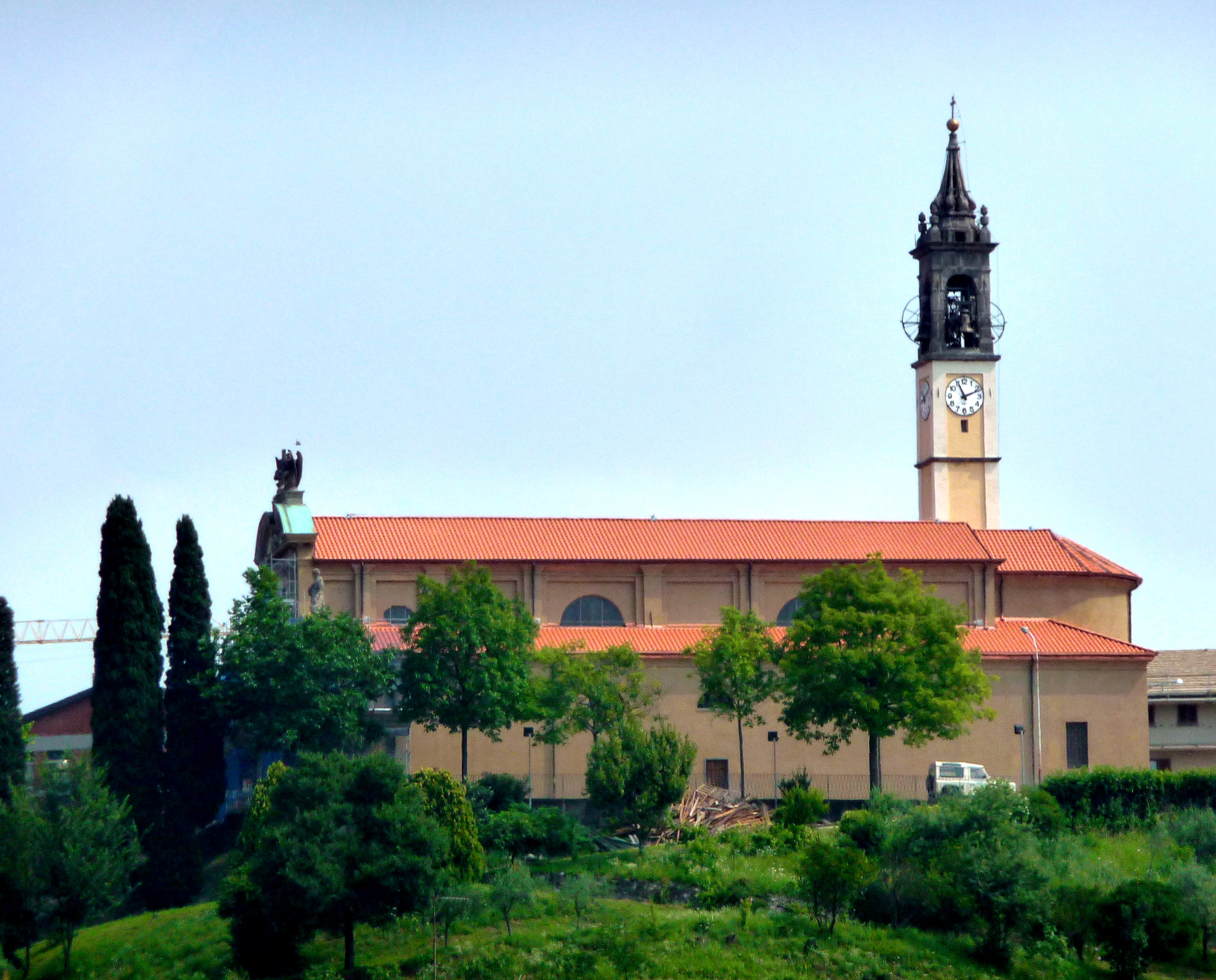 Chiesa di Tabiago, mia foto